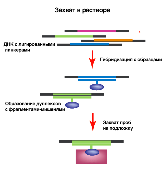 Зазват проб в растворе